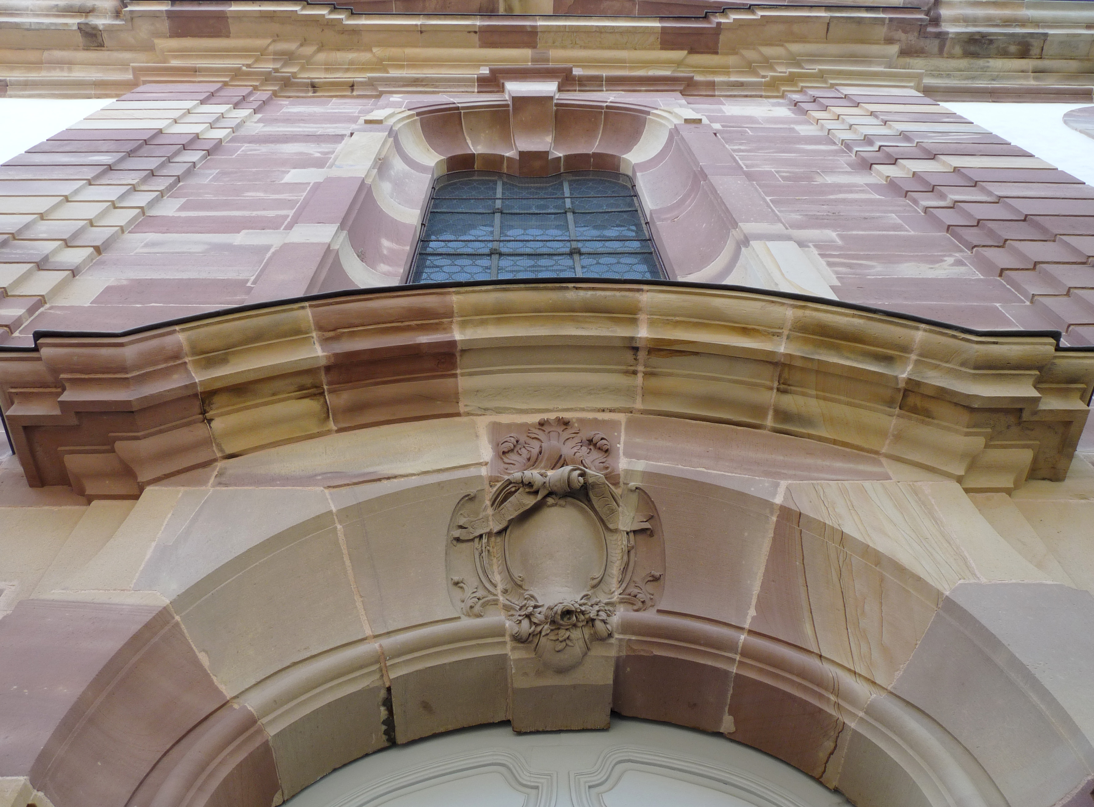 Avant-corps en grès surmontant le portail principal de l'église Sainte-Aurélie de Strasbourg.